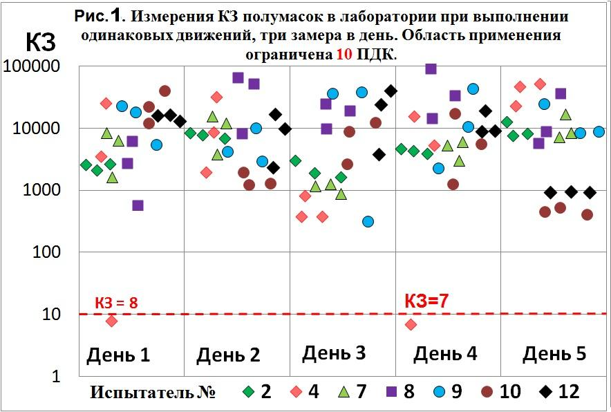 Непостоянство коэффициентов защиты при выполнении одинаковых движений в лаборатории